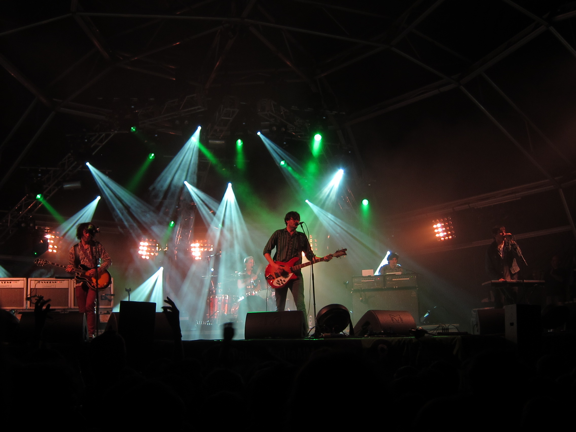 Cultura Quente 2011 Caldas de Reis 22 Jul 2011